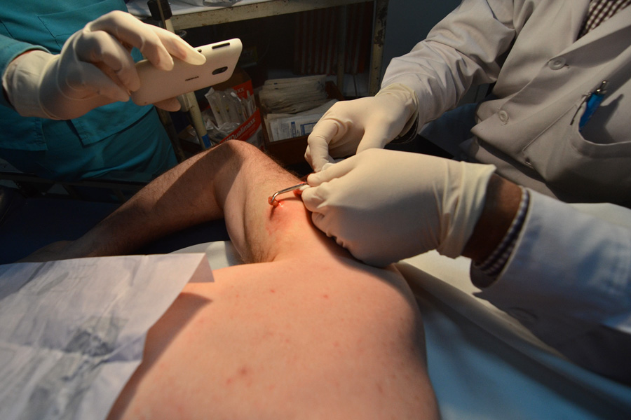 Lima, Peru